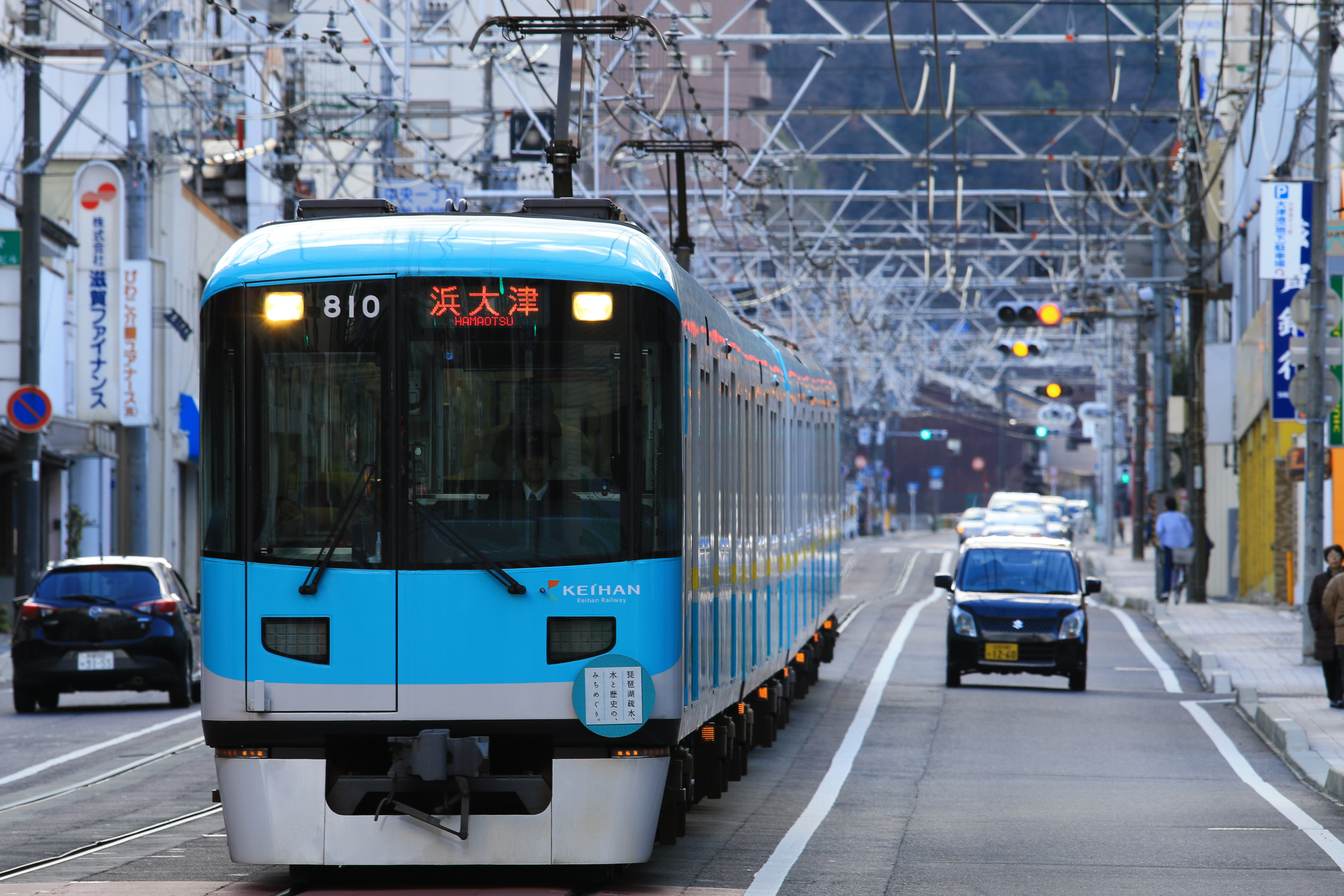 琵琶湖へ向けてラストスパート。慎重に坂を下る。